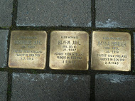 אבני זיכרון בכניסה לבתים בהם התגוררו יהודים